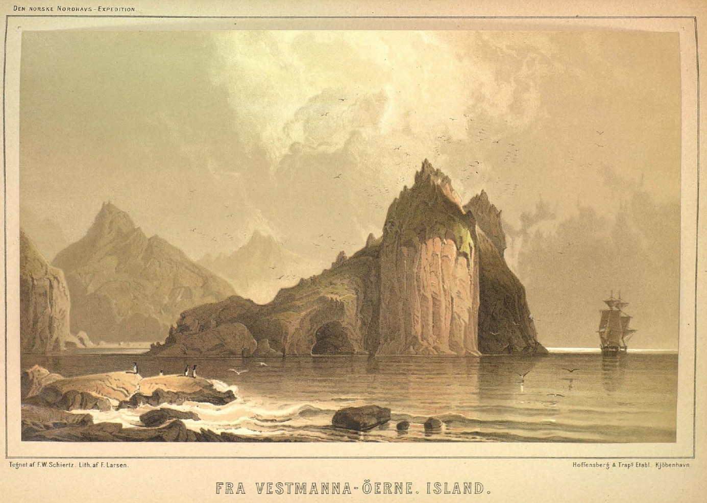 Franz Wilhelm Schiertz: Fra Vestmanna Öerne. Island